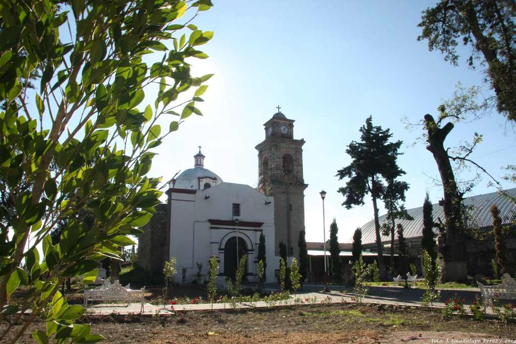 Totolac, Tlaxcala Foto: J. Guadalupe Pérez /2014